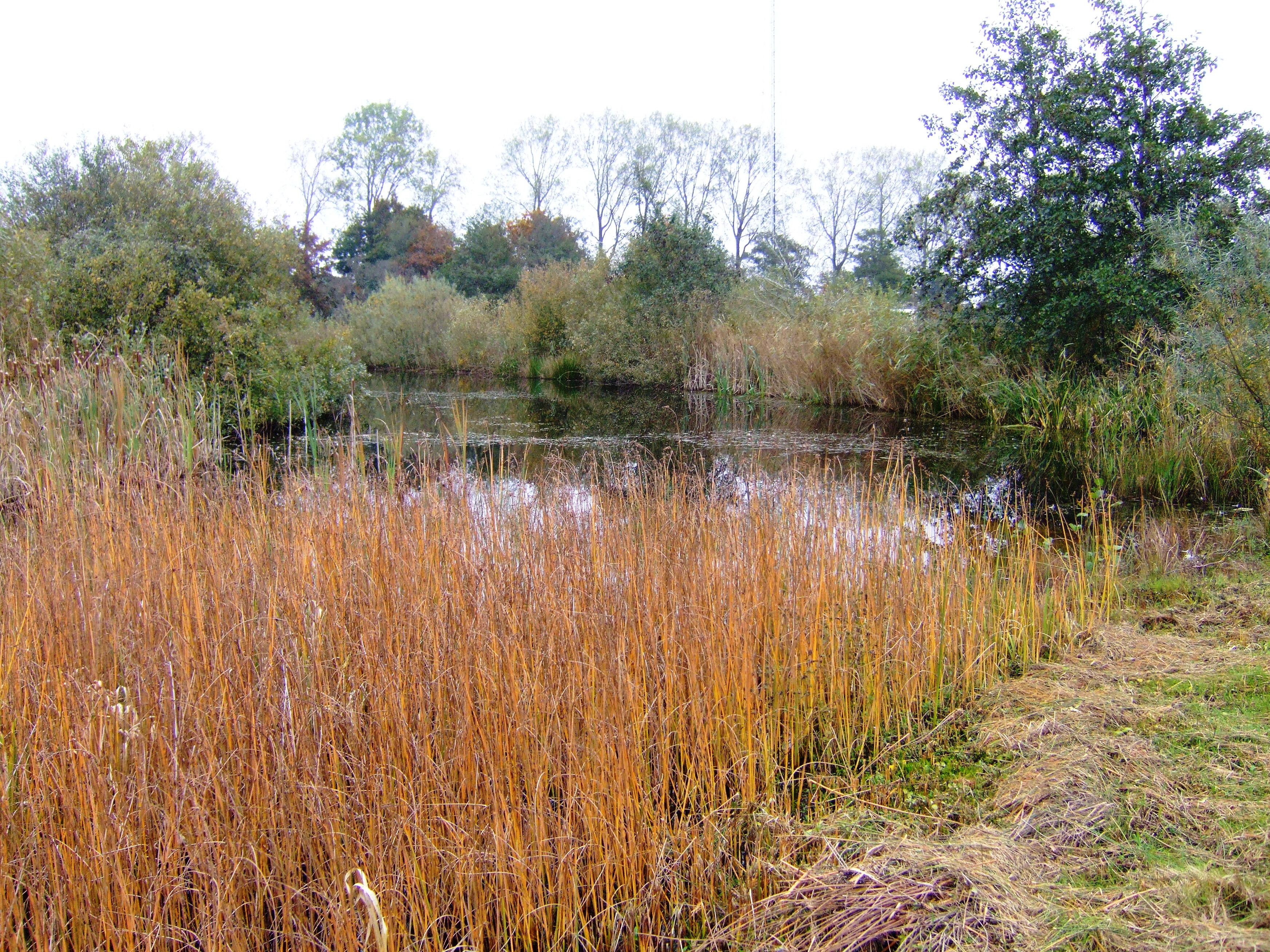 De poelen in De Twigen zijn van groot belang voor de inheemse flora en fauna.